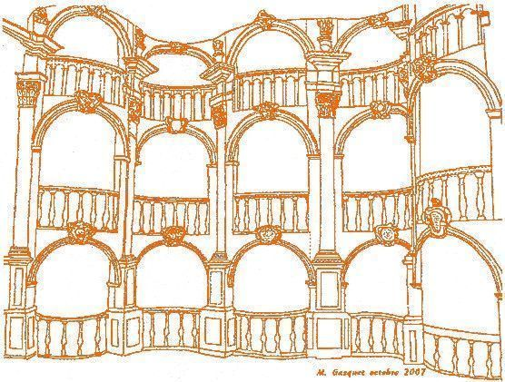 Dessin créé en octobre 2007 avec un logiciel de traitement d'images